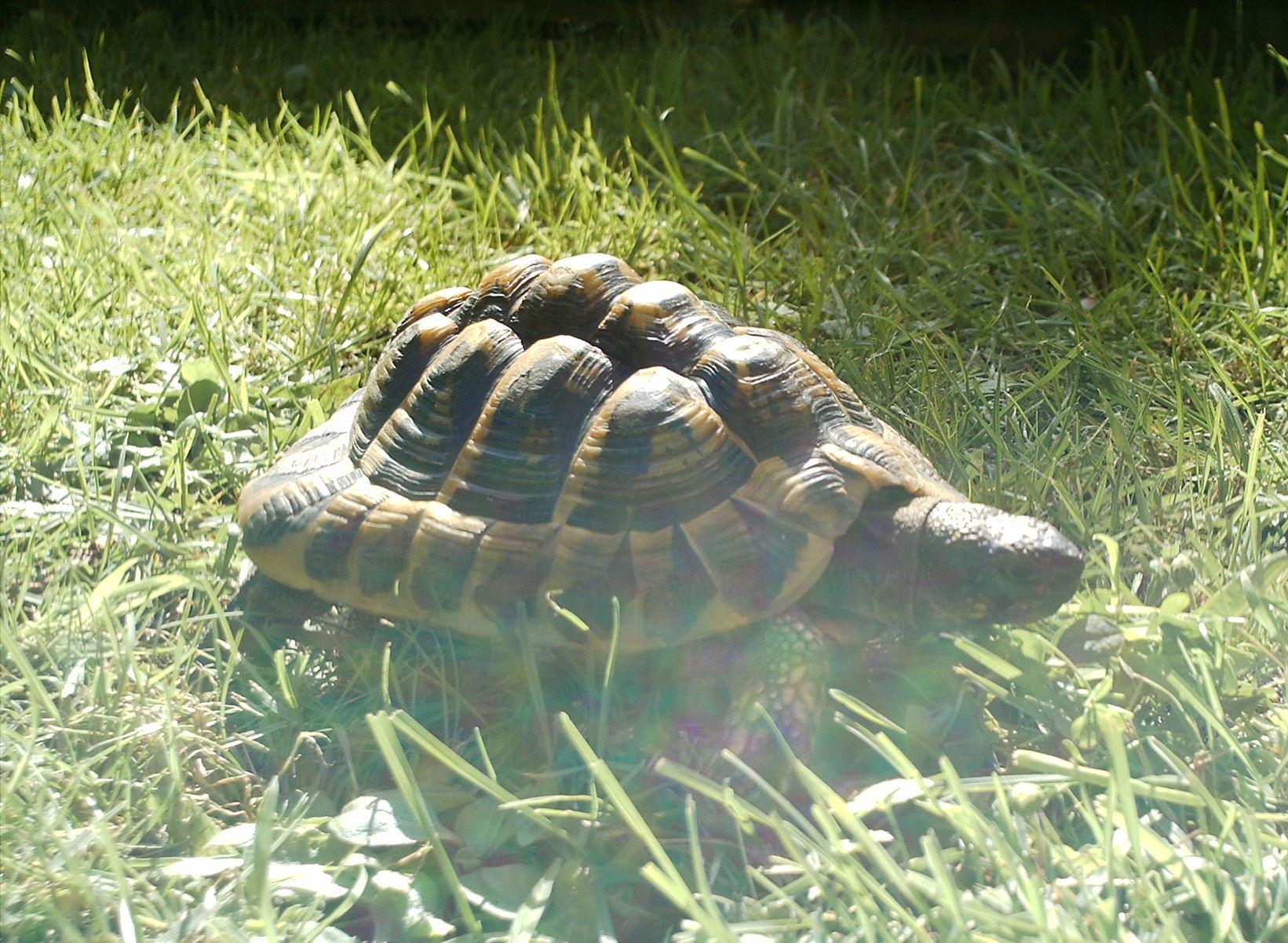 a greek tortoise(my pet)